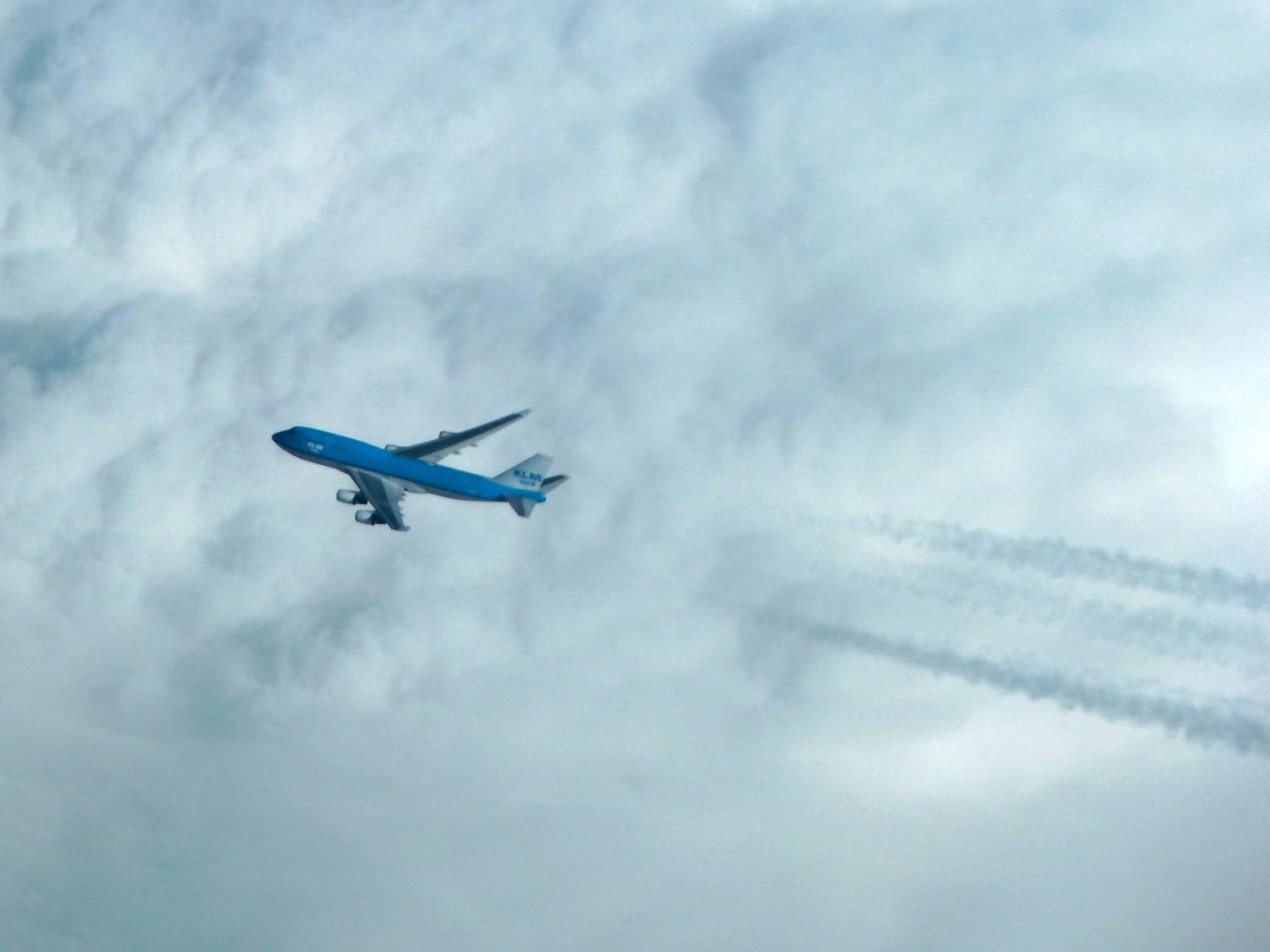 アムステルダムに向けて東北地方上空を飛行するKLMボーイング747。（JAL1205-A300機内より撮影）